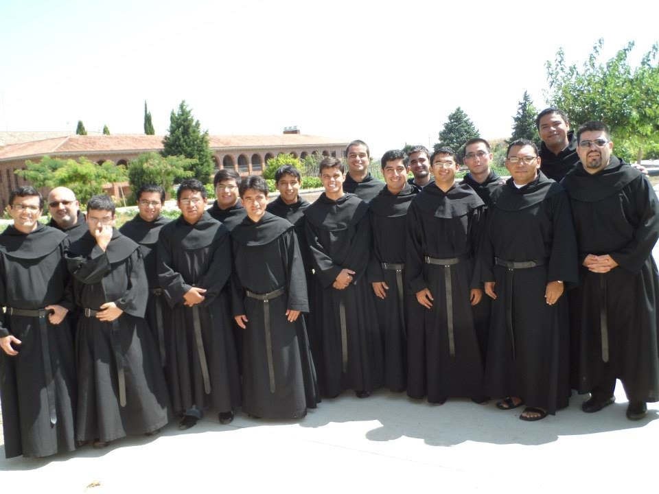 Religiosos Agustinos Recoletos en el Convento de Monteagudo, Navarra.